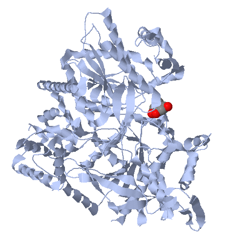 He sacado un foto de la estructura de esta enzima de la pagina del protein explorer.